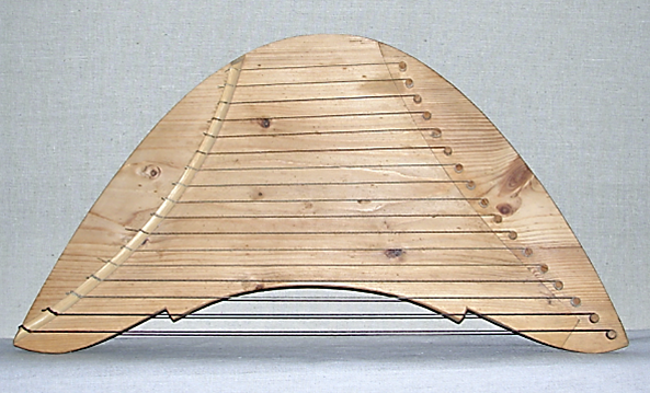 Реконструкция В.И.Поветкина новгородских гуслей-псалтиря XIV в. по материалам изобразительных источников и находок из раскопок в Великом Новгороде (Россия)